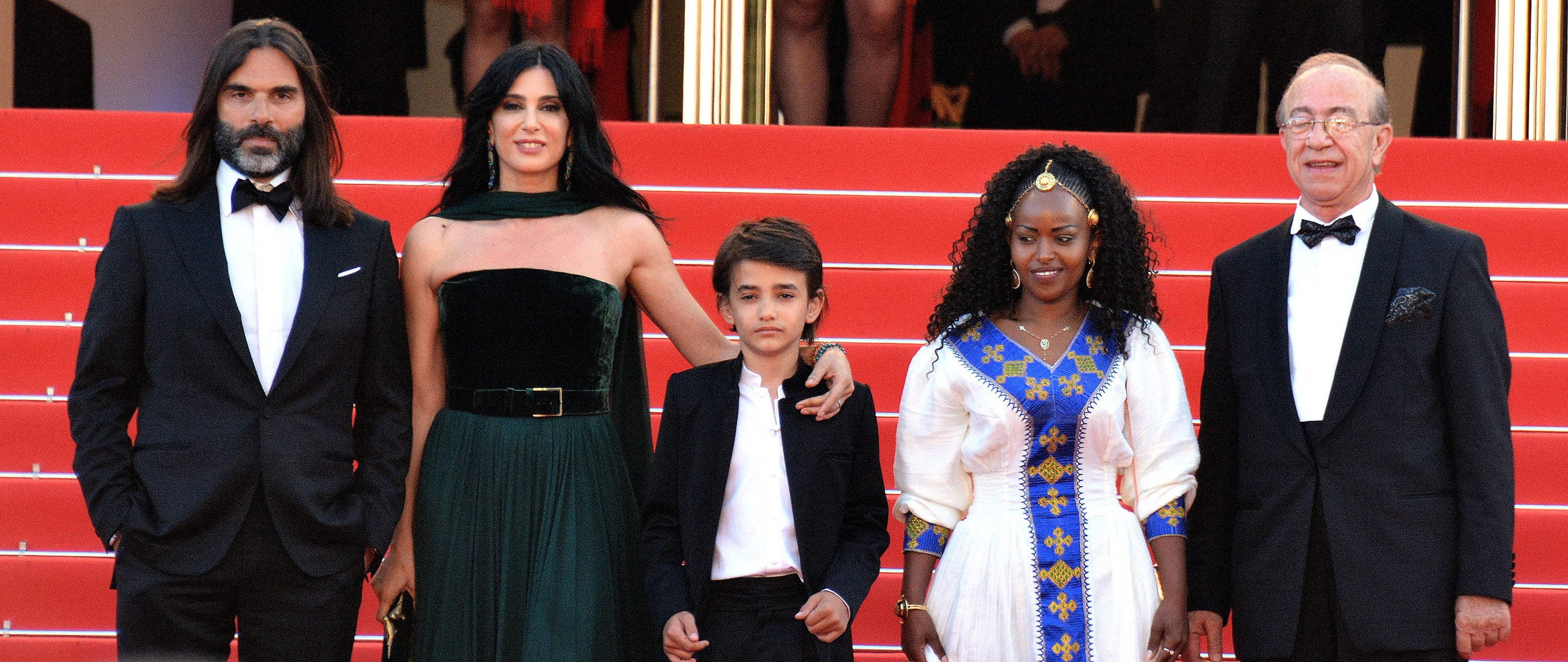 festival de Cannes